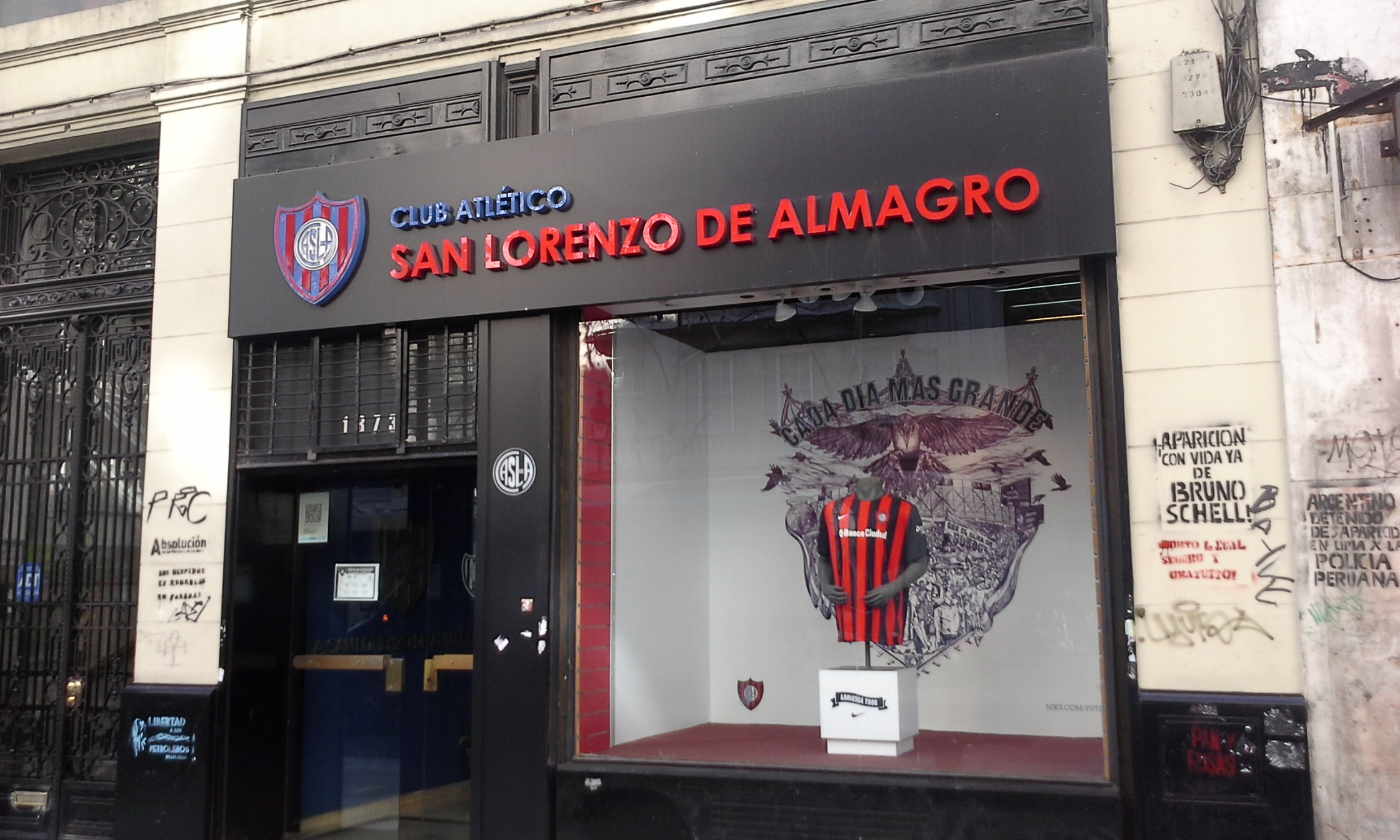 Sede San Lorenzo de Almagro de Av. de Mayo Cap. Federal, Buenos Aires